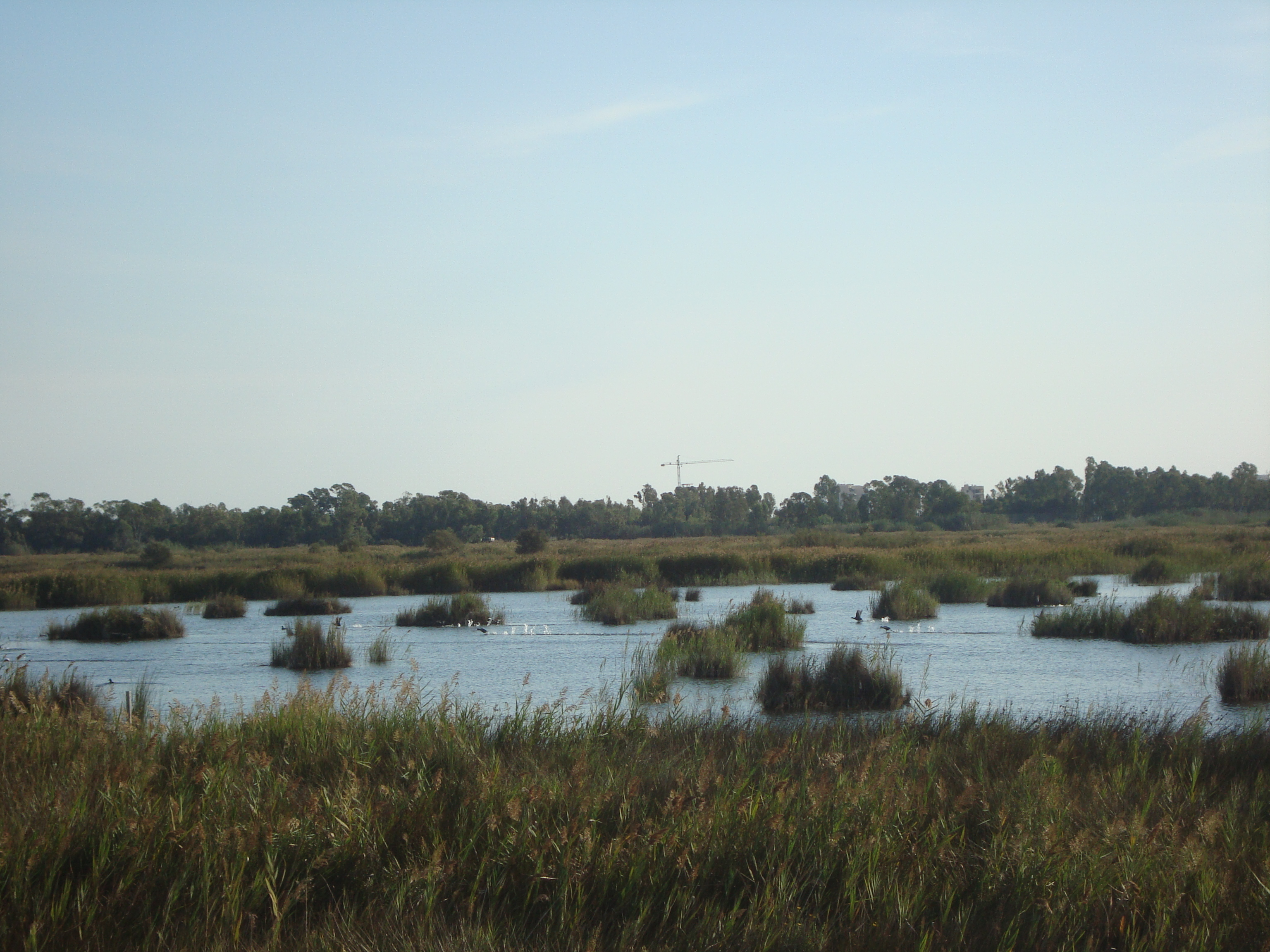 Paraje Natural del Prat de Cabanes-Torreblanca (Castellón, Comunidad Valenciana, España). Vista panorámica del lugar llamado "Els Clots", "Clots de la Turba", situados al extremo septentrional del Paraje Natural del Prat junto a Torrenostra en el término de Torreblanca .